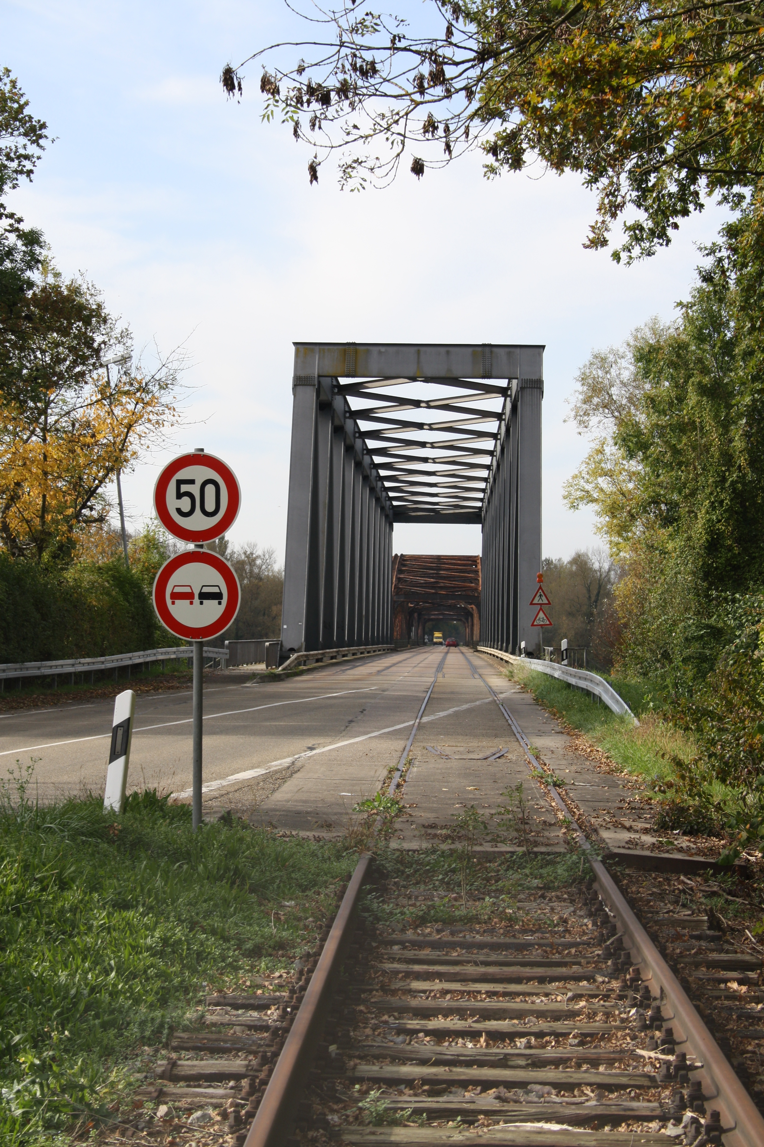 Rheinbrücke Wintersdorf von Osten